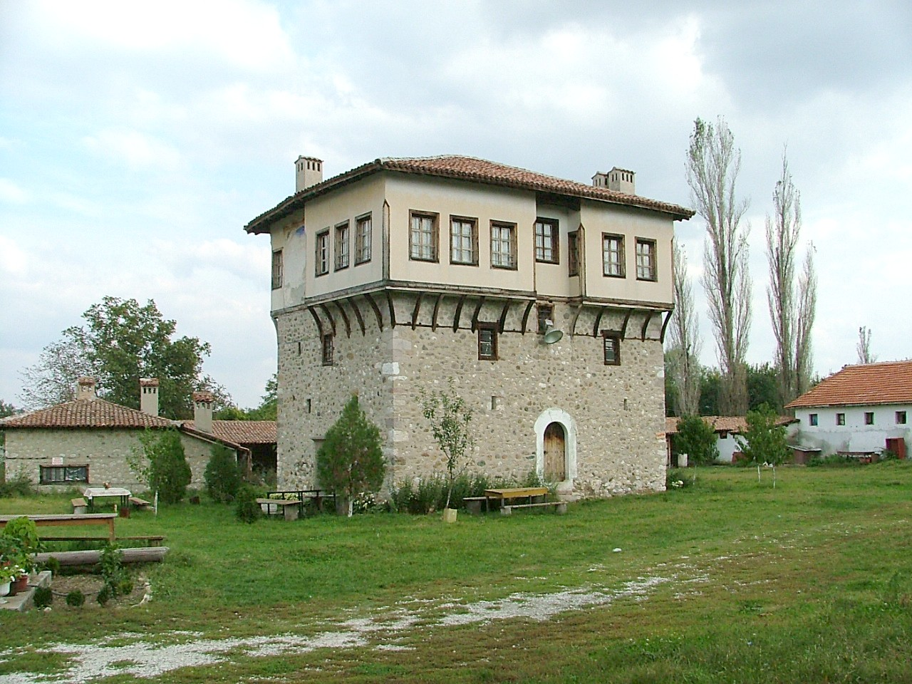 Arapovo Monastery near Asenovgrad, Bulgaria Angel Voyvoda's Tower This file, which was originally posted to , is licensed under Creative Commons Attribution 2.5 License. Attribution: Peter Georgiev In short: you are free to distribute and modify the file as long as you attribute its author(s) or licensor(s).Check for other images from this website. Този файл, оригинално качен на сайта , е лицензиран под условията на лиценза Creative Commons Признание 2.5. Признание: Peter Georgiev Накратко: имате свободата да разпространявате и променяте файла, стига да посочвате неговия (неговите) автор(и) или лицензодател(и).Разгледайте други картинки от този уебсайт.